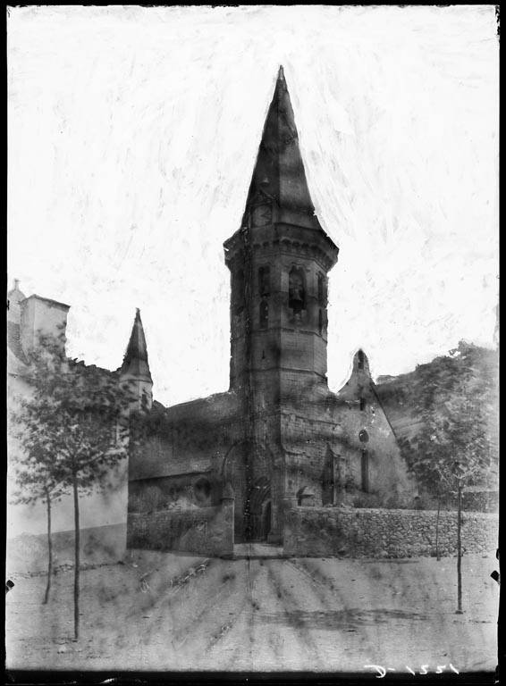 Imatge